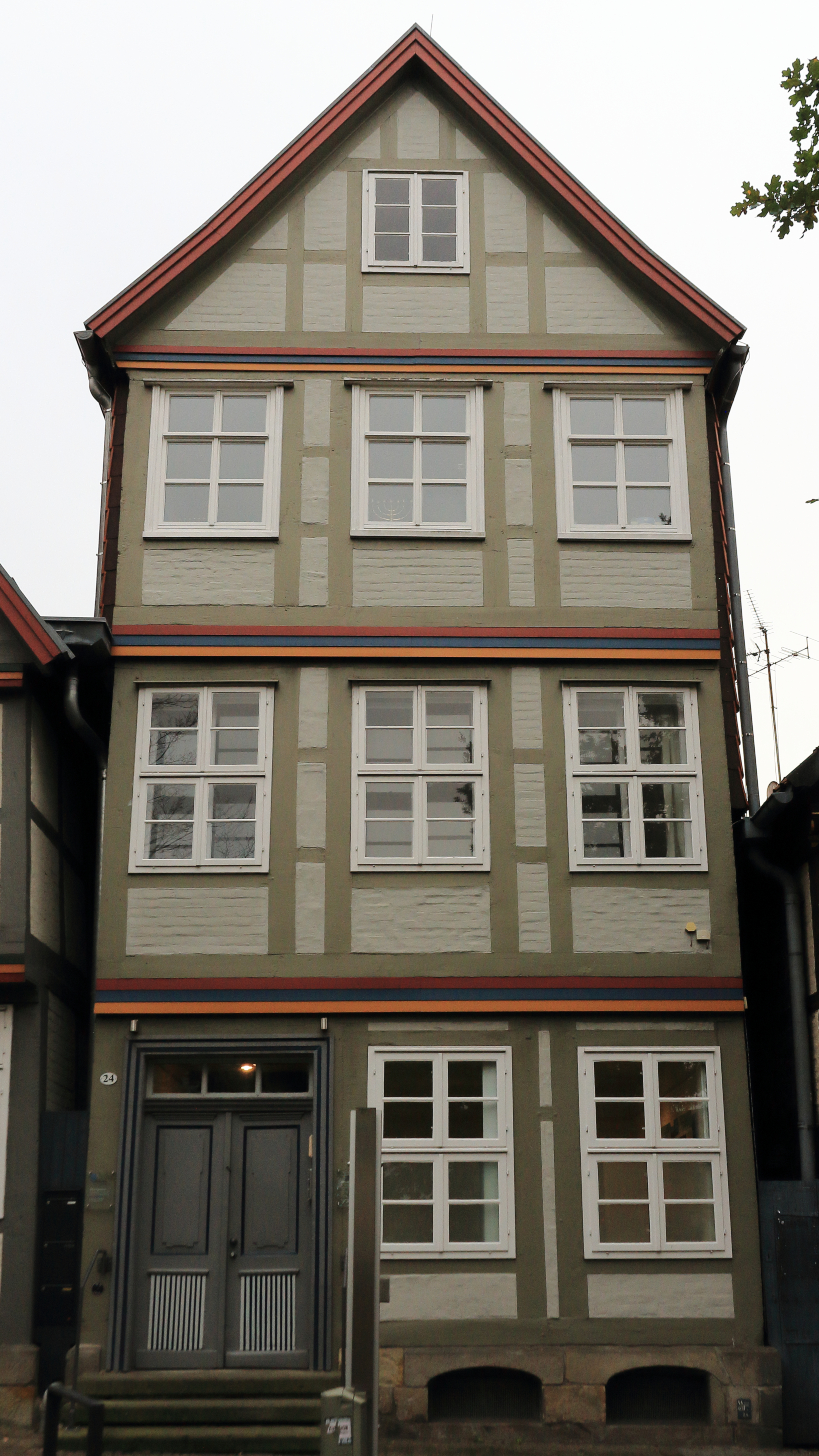 Über 250 Jahre alte Synagoge. ‚Im Kreise‘ 24, Celle